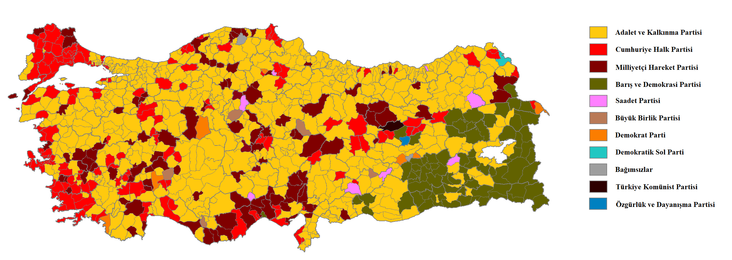 2014 Türkiye Yerel Seçimlerinin İlçe Bazlı Gösterimi